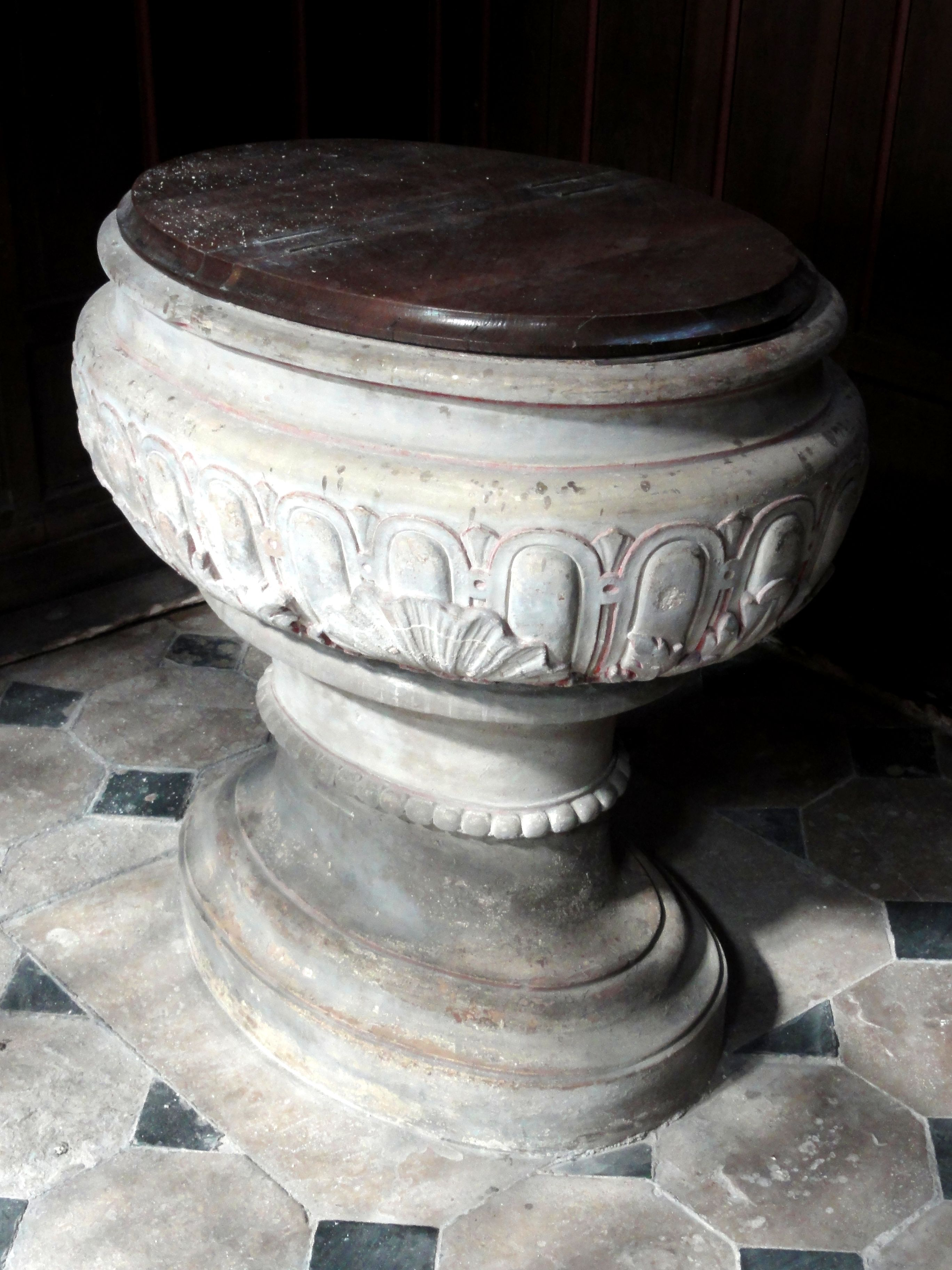 Les fonts baptismaux (dans la première chapelle du bas-côté nord).